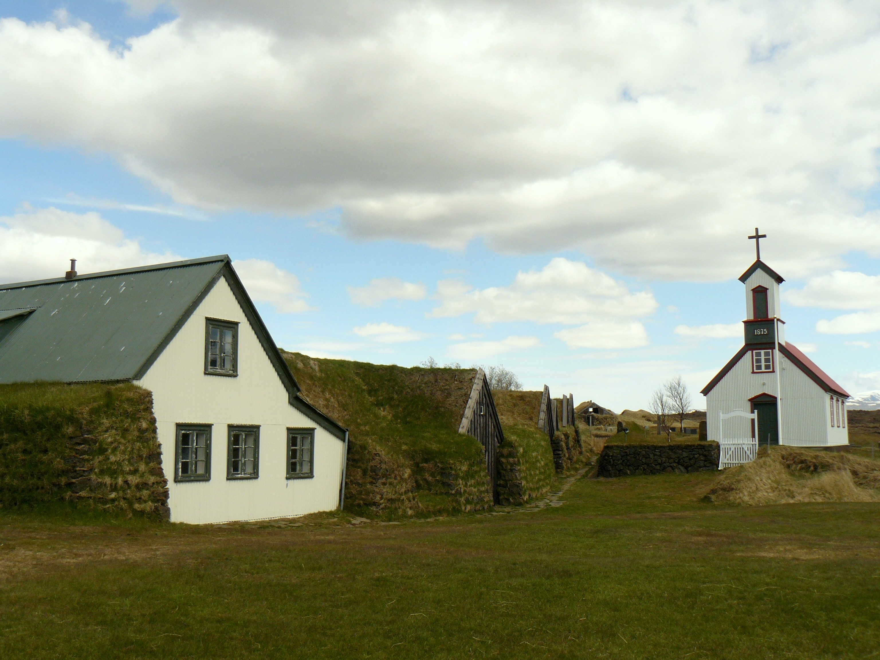 Vue du hameau historique de Keldur á Rangárvöllum (Islande)